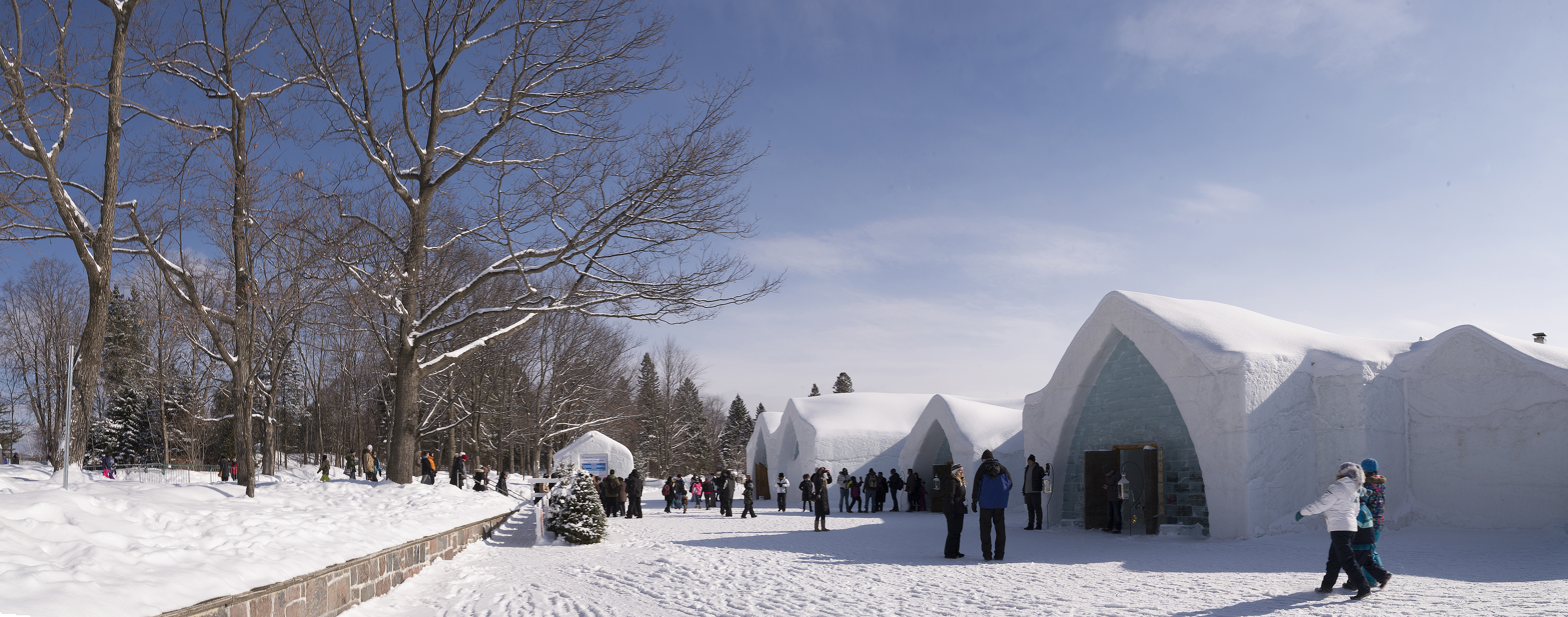 Épurée et naturelle, la chambre Hôtel de Glace de Québec représente l’expérience d’origine. Évoquant l’intimité de l’igloo, les chambres Hôtel de Glace possèdent un, deux ou trois lits queen.